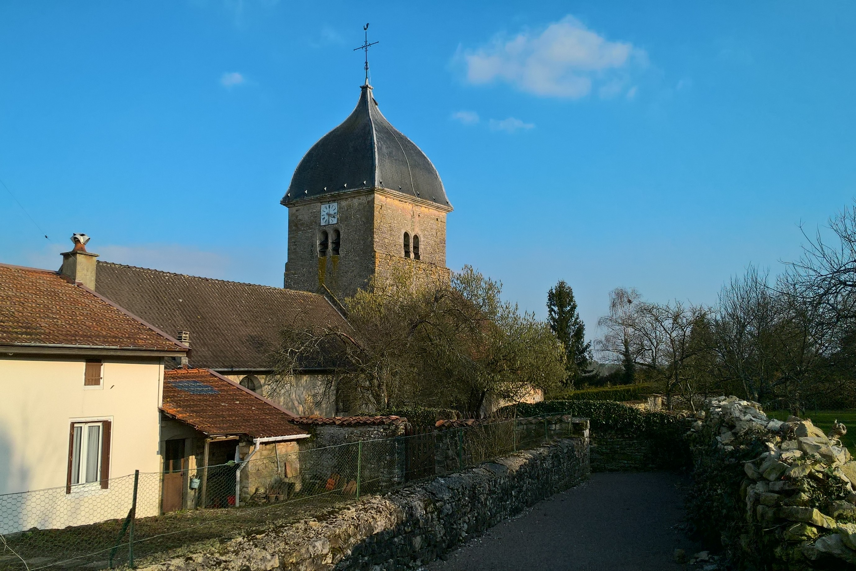 Courcelles-sur-Blaise, église